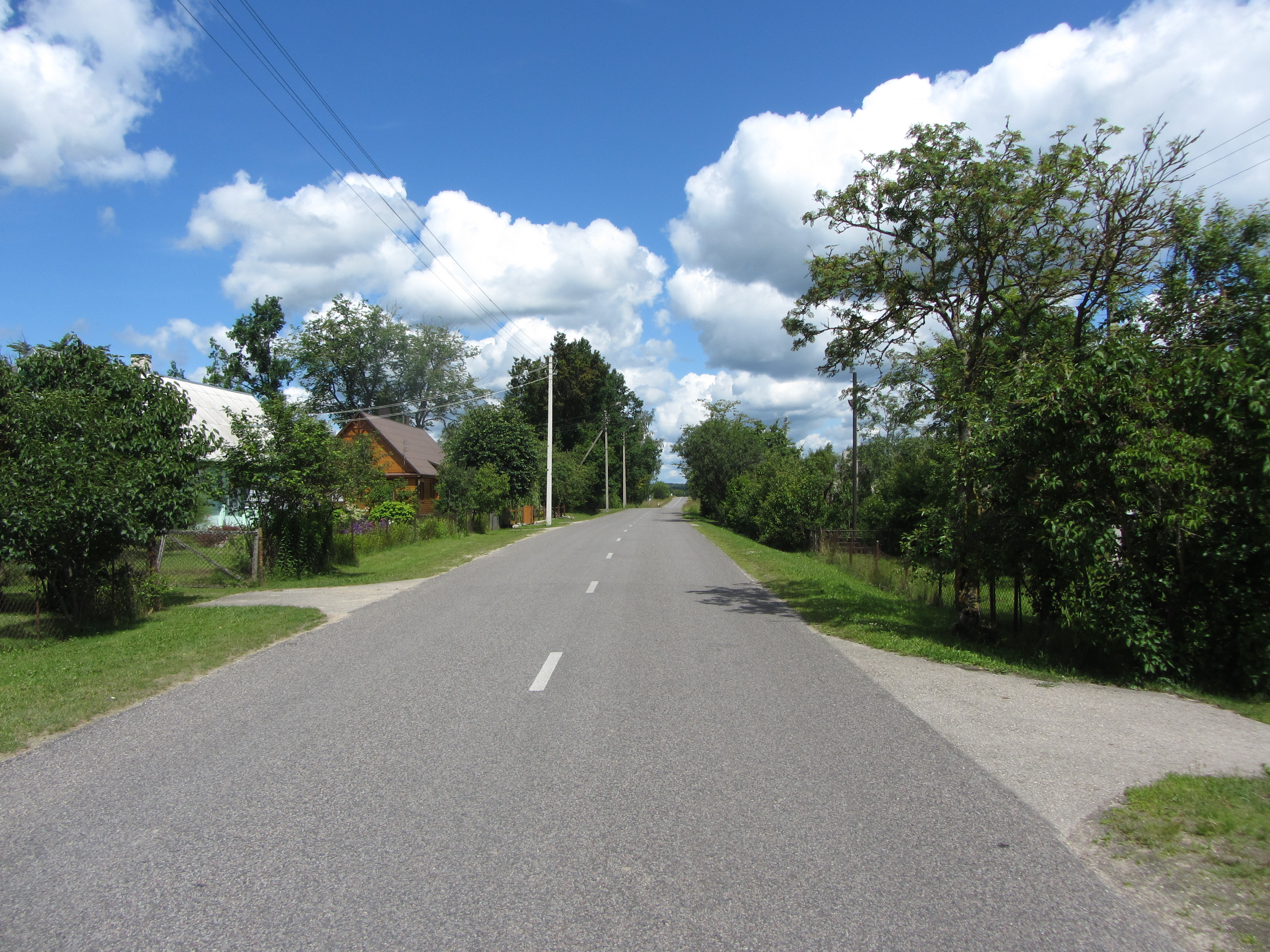 Vidutinė, Lithuania